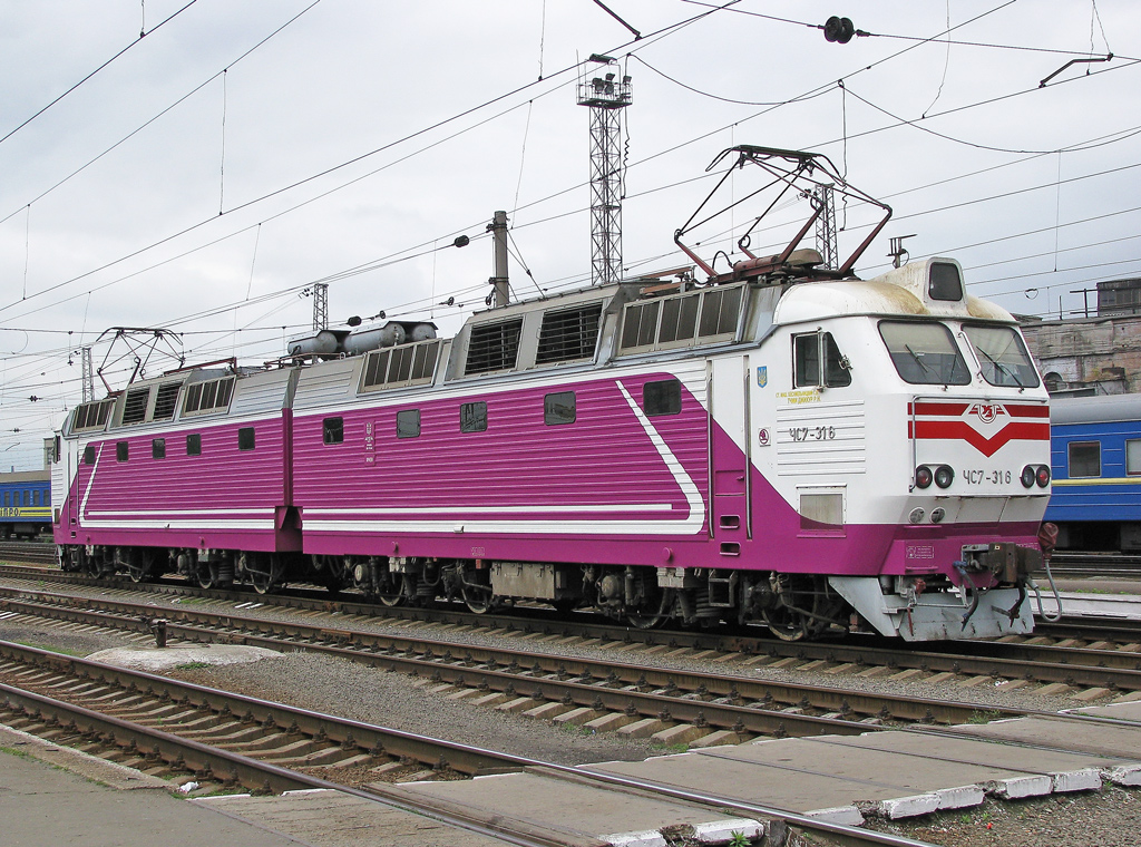 Электровоз ЧС7-316 на станции Днепропетровск